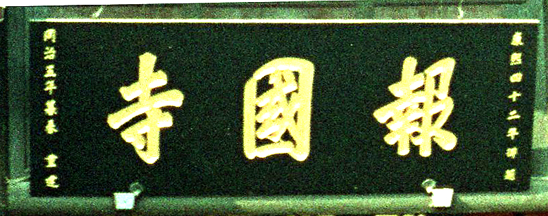 康熙御题报国寺额匾